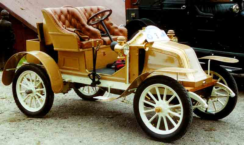 Renault AX 3-Seater 1909